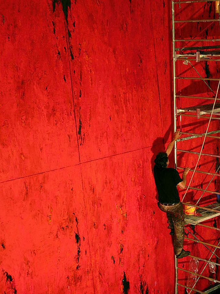 Bei der Arbeit im Atelier in Casalmaggiore